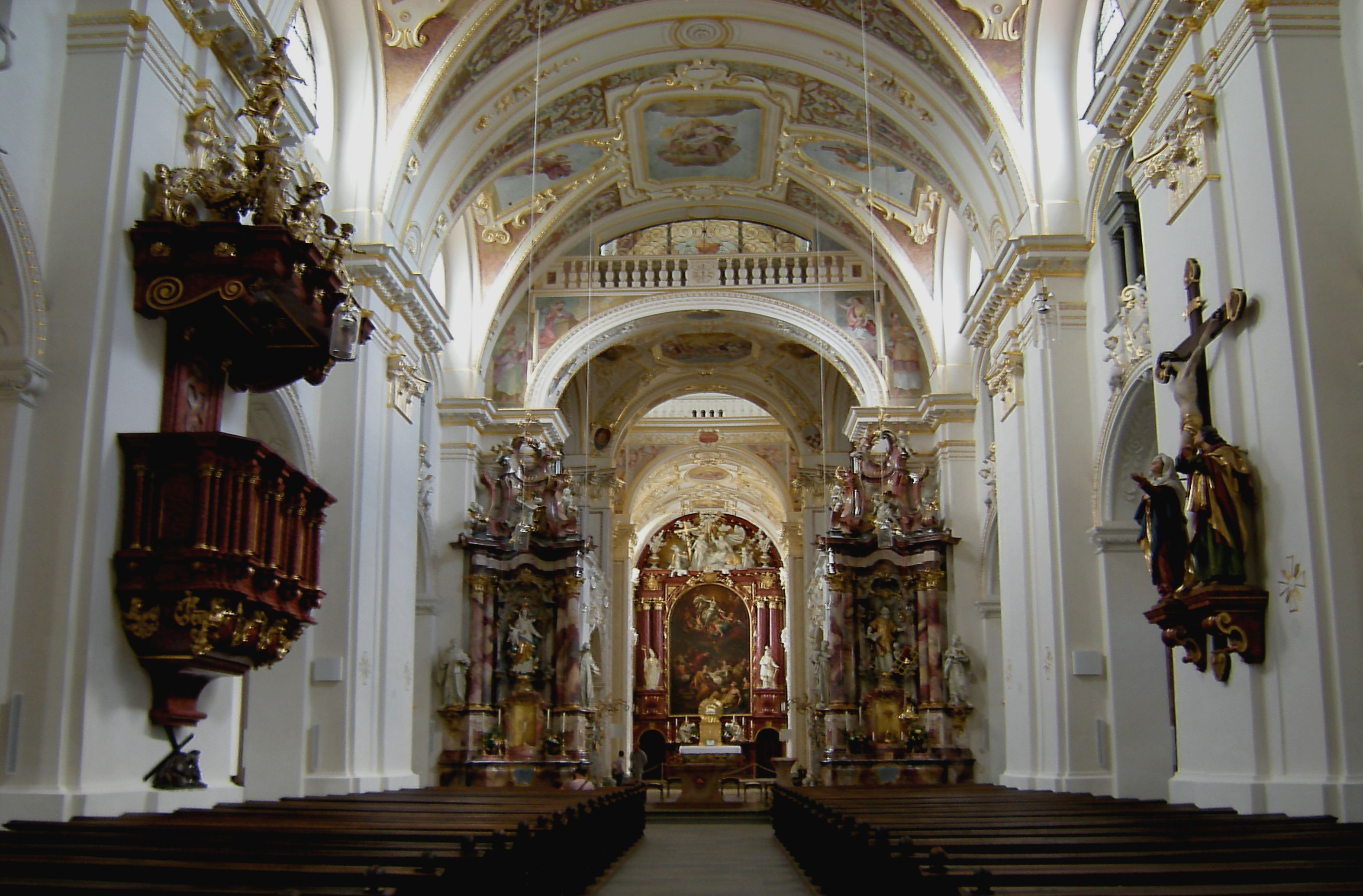 Kempten - Stadtpfarrkirche St. Lorenz